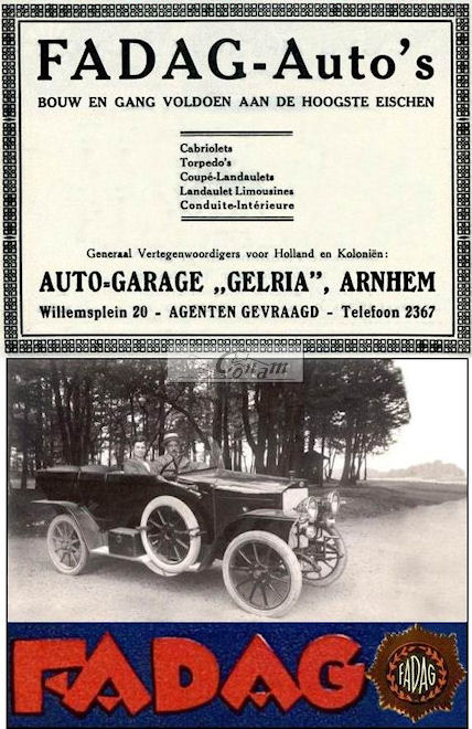 Fadag (D) - Gelria, Arnhem advertentie december 1920